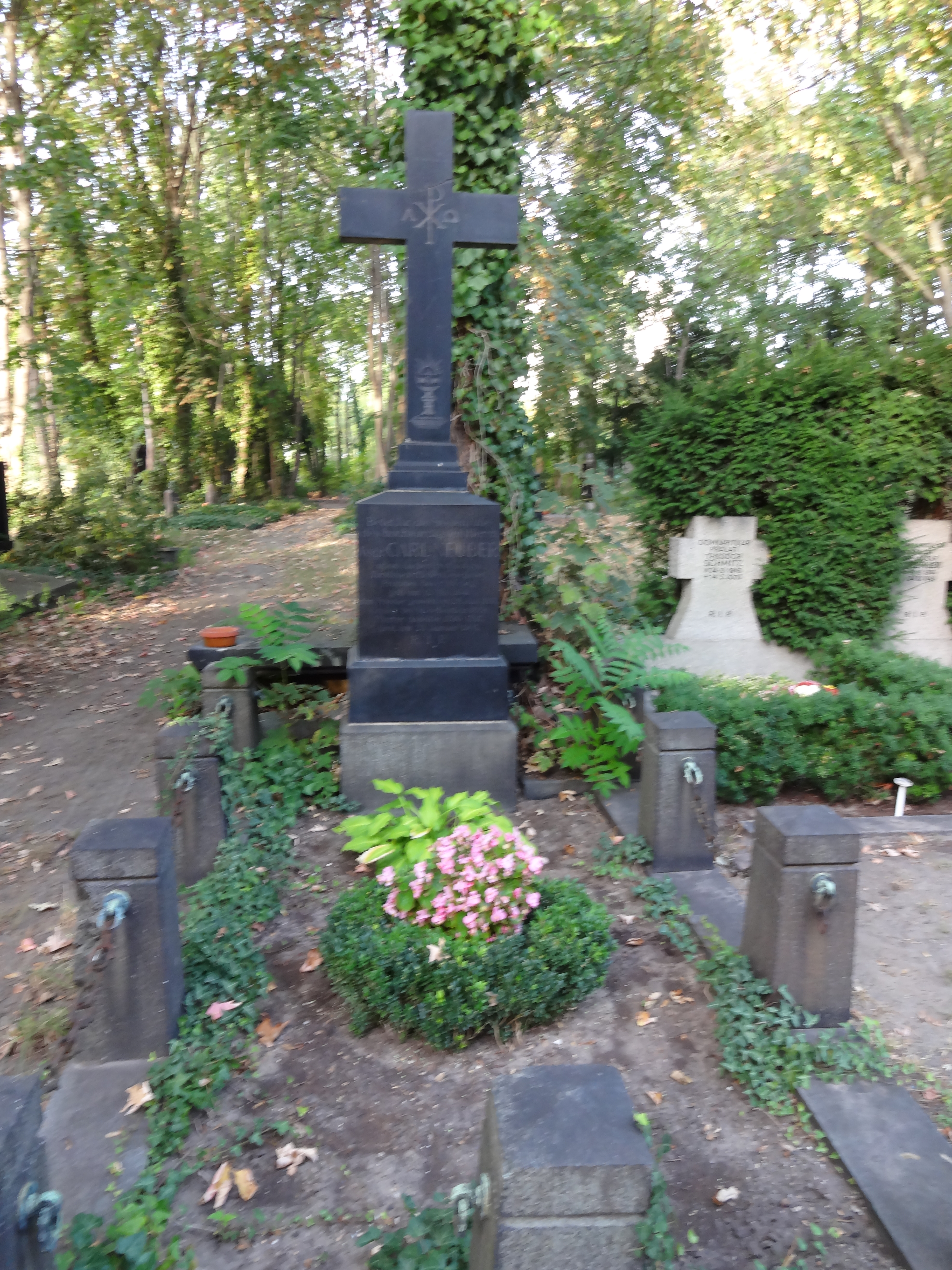 Grab von Carl Neuber auf dem Alten Domfriedhof der St.-Hedwigsgemeinde in der Liesenstraße in Berlin